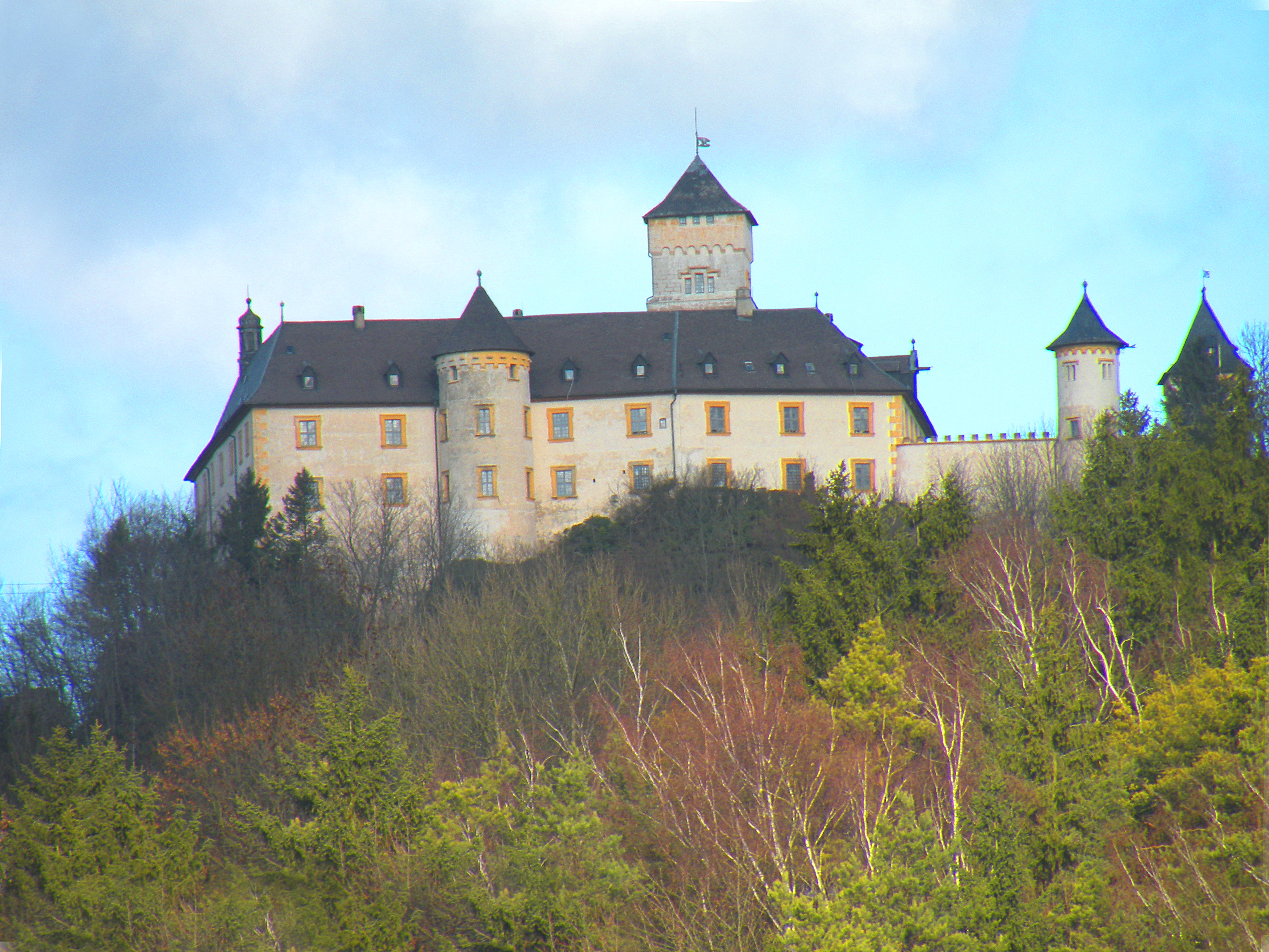 Франконская Швейцария. Замок Грайфенштайн